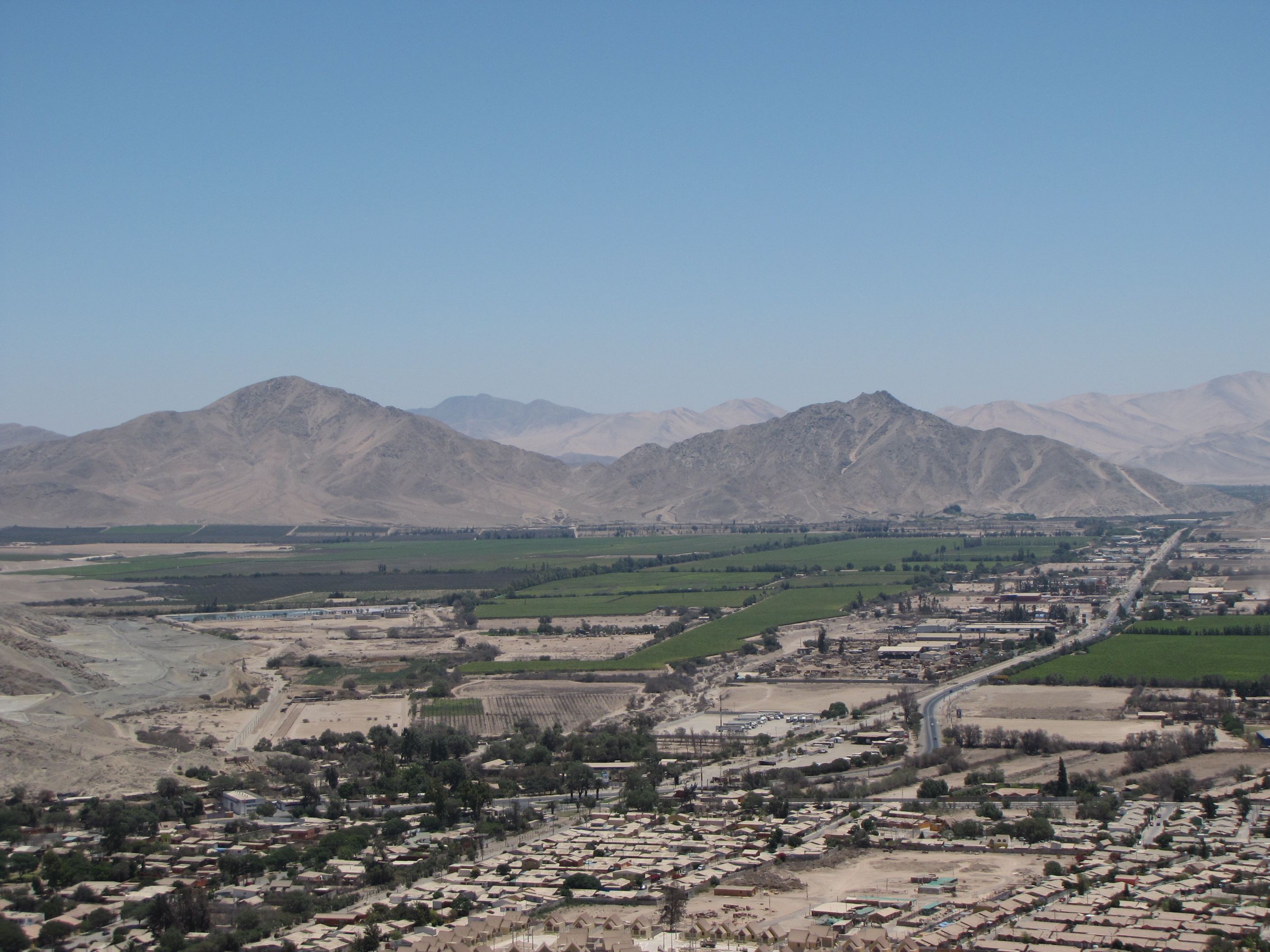 cultivos en las márgenes de la ciudad de Copiapó, los cuales se hallan en el valle del río Copiapó.